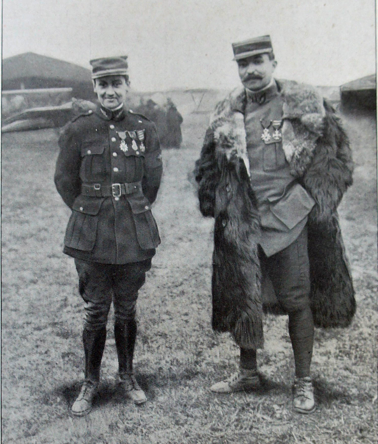 Georges Guynemer Antonin Brocard. Photographie de la Première guere mondiale.